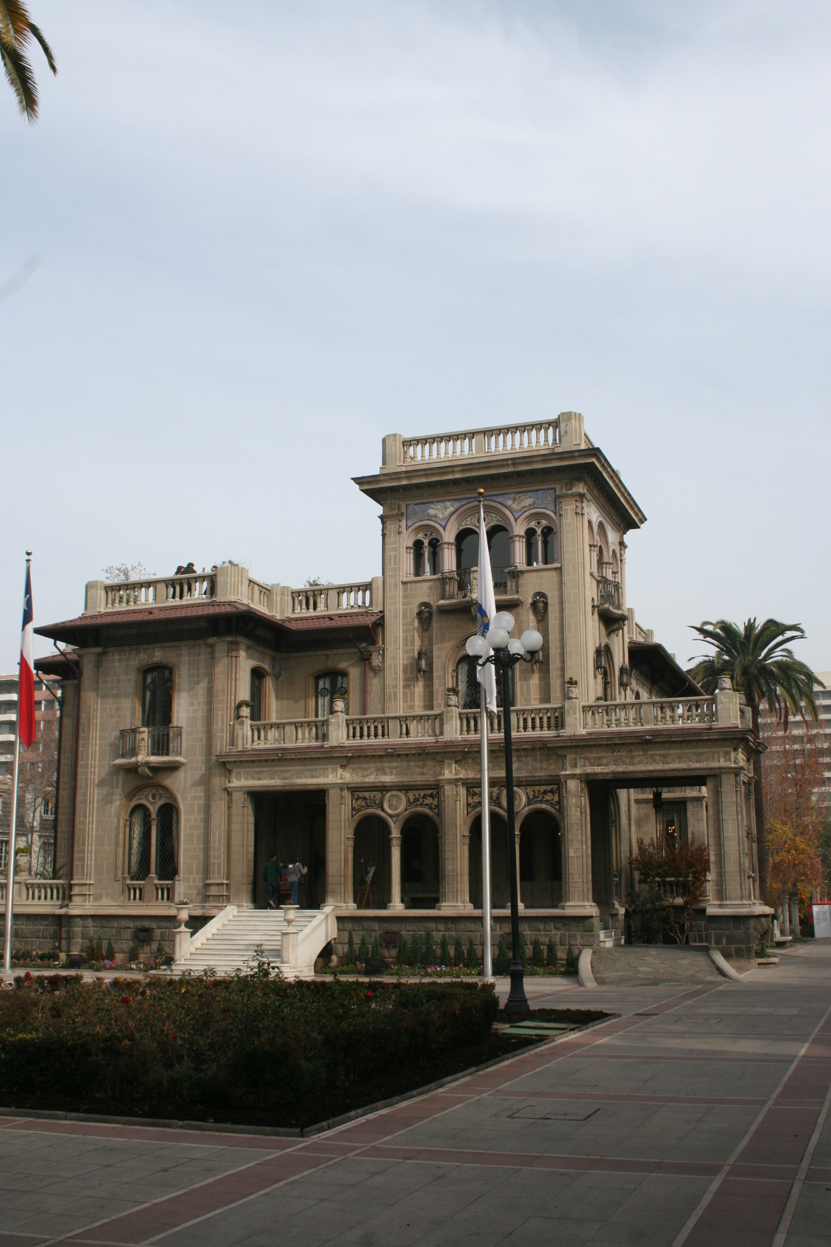 Frontis de el Palacio Falabella mirado desde Av. Pedro de Valdivia